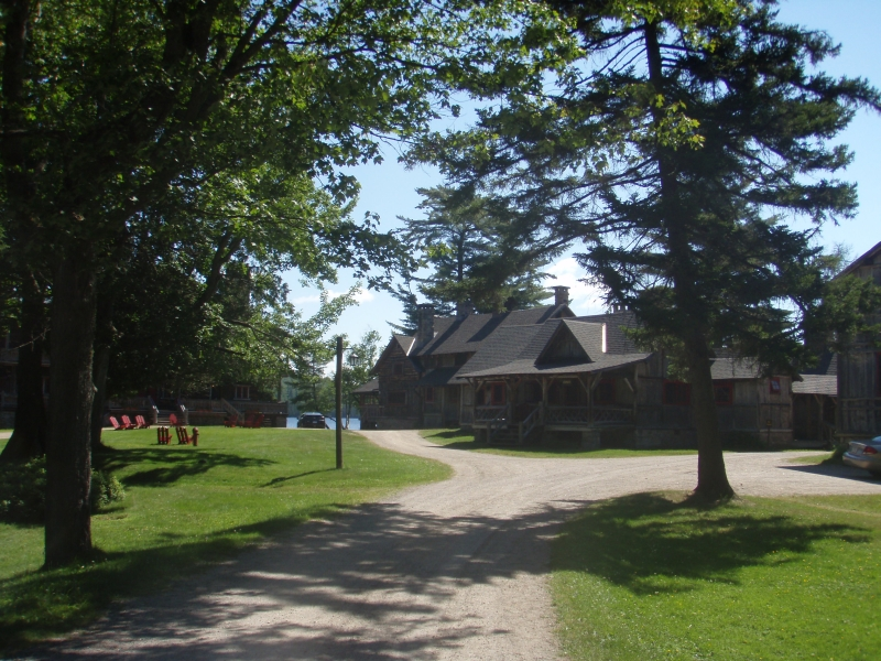 CampSagamore, Raquette Lake, NY, Wohnhütten